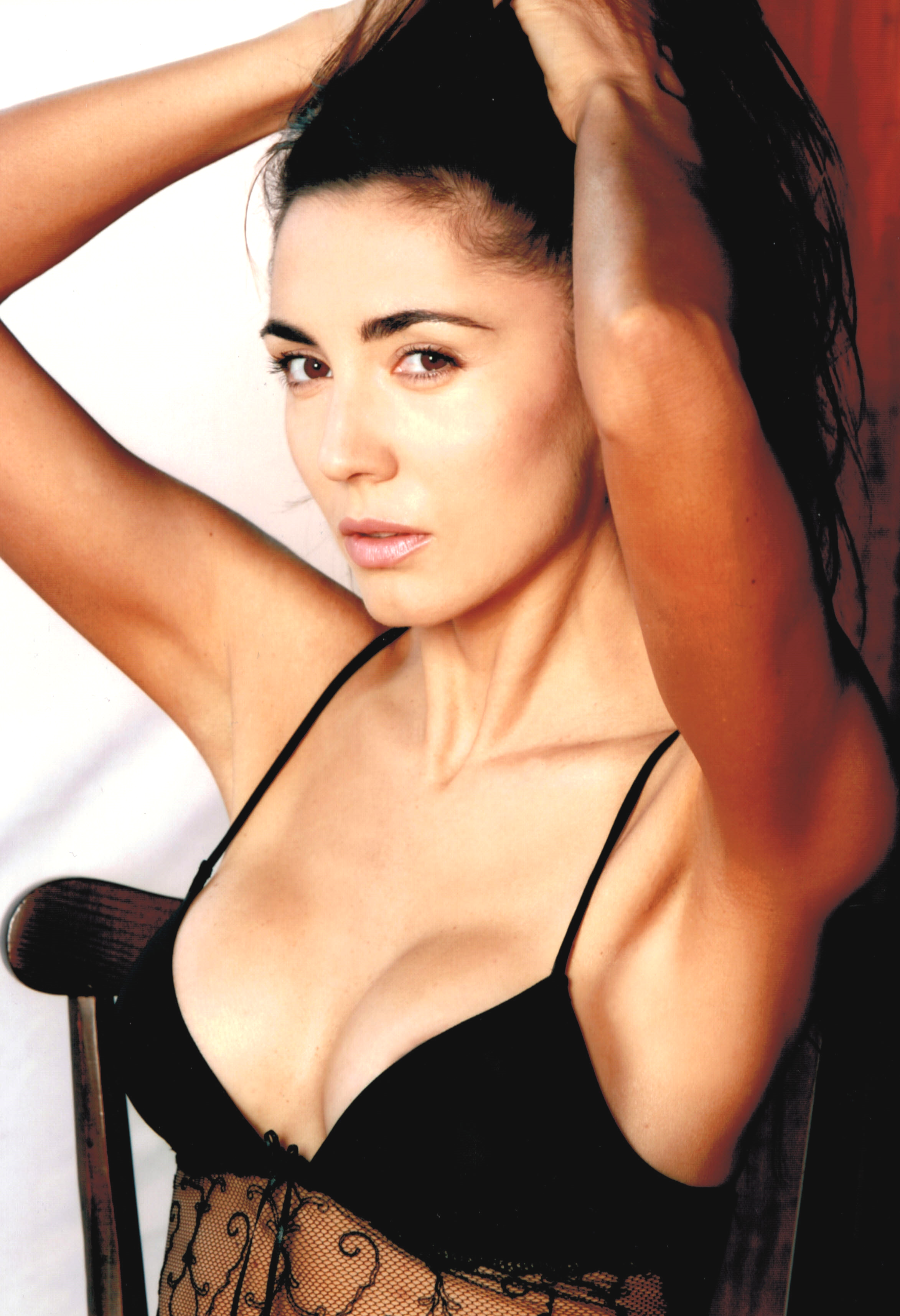 Michelle Bonev